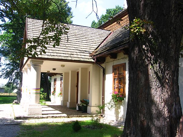 Krzykawka - dwór, 1 ćw. XVIII, 1938, 1984-1989